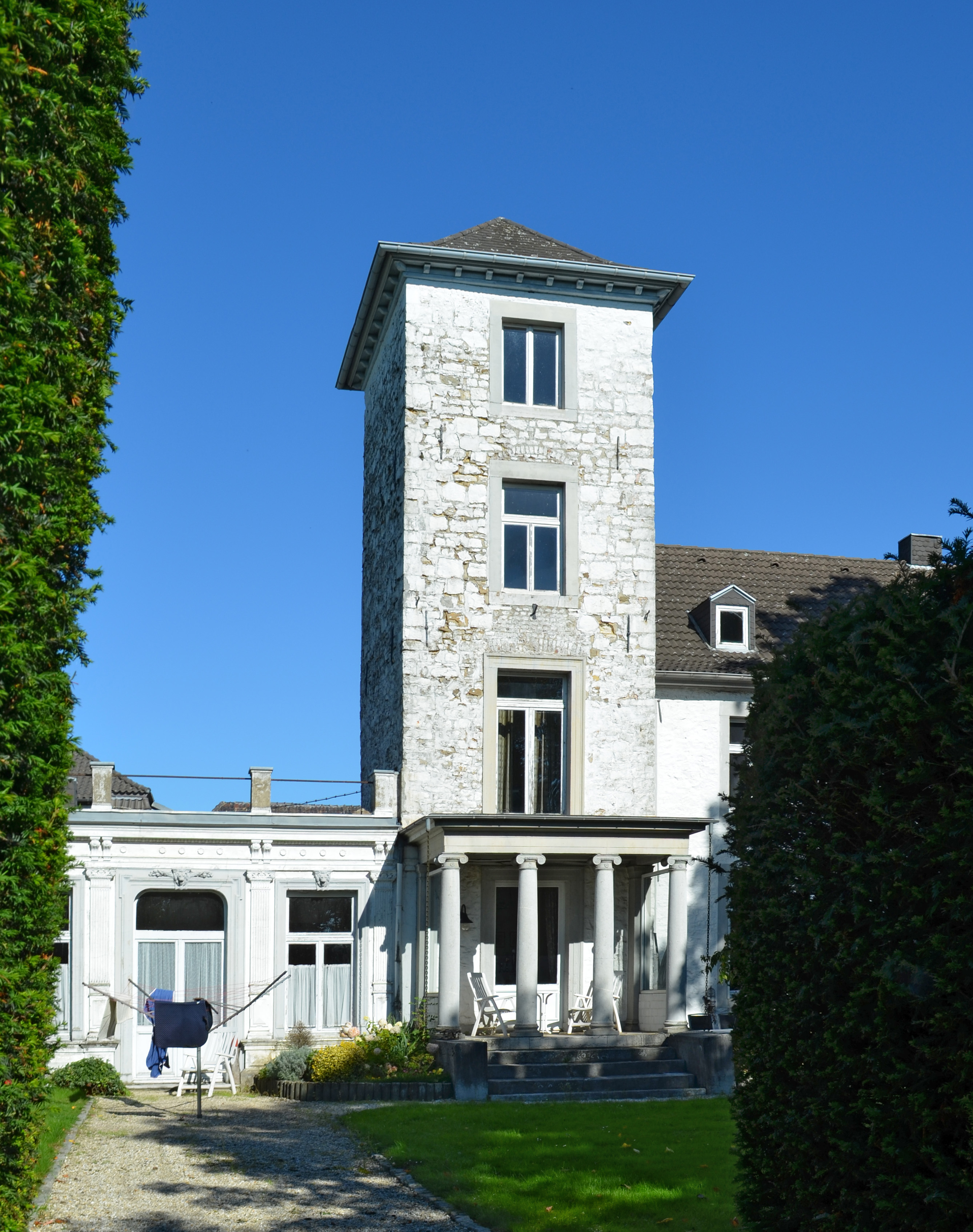 Vierecksturm des Schlosses Berensberg in Herzogenrath-Kohlscheid